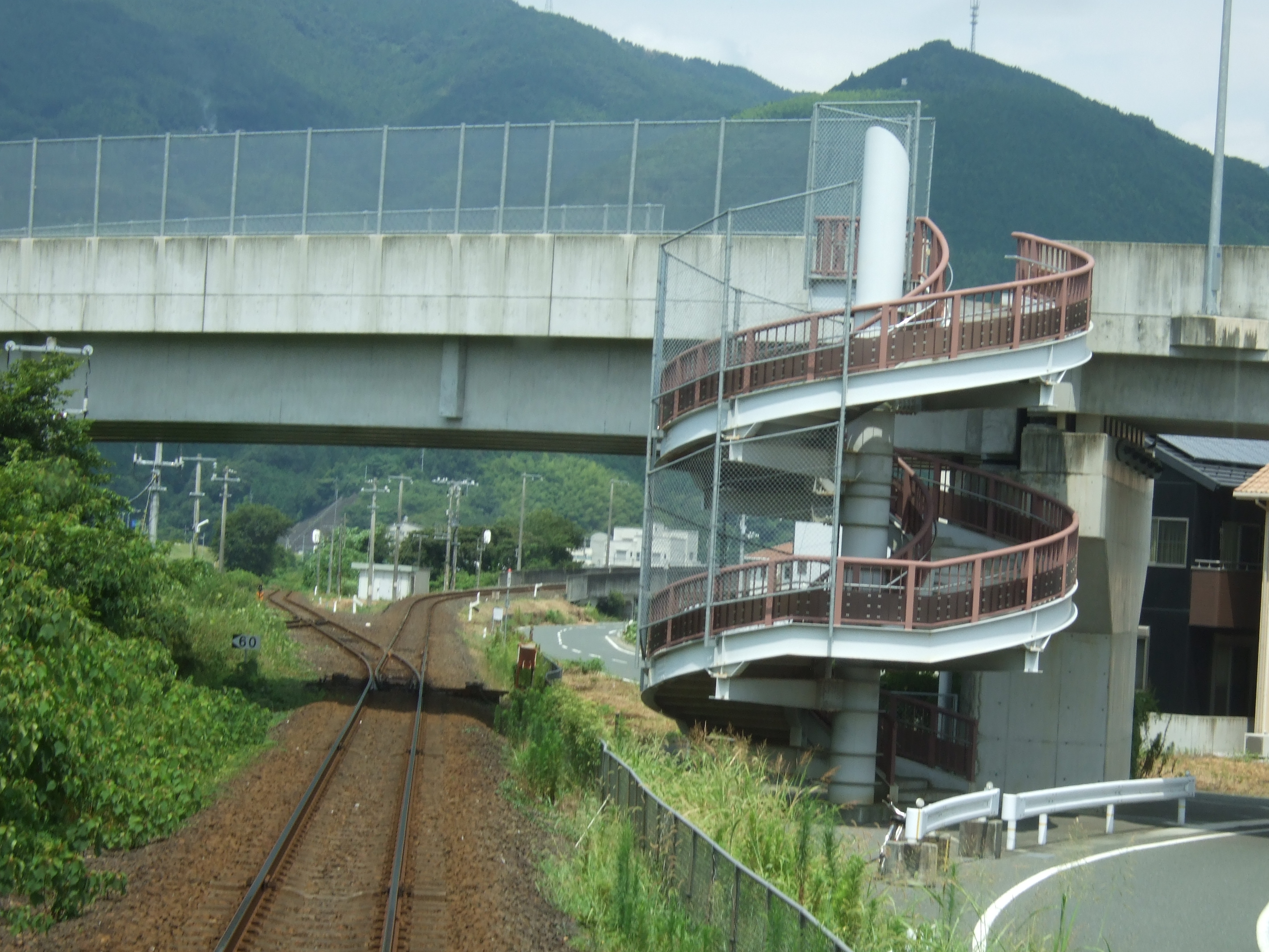 分岐の手前。列車から。